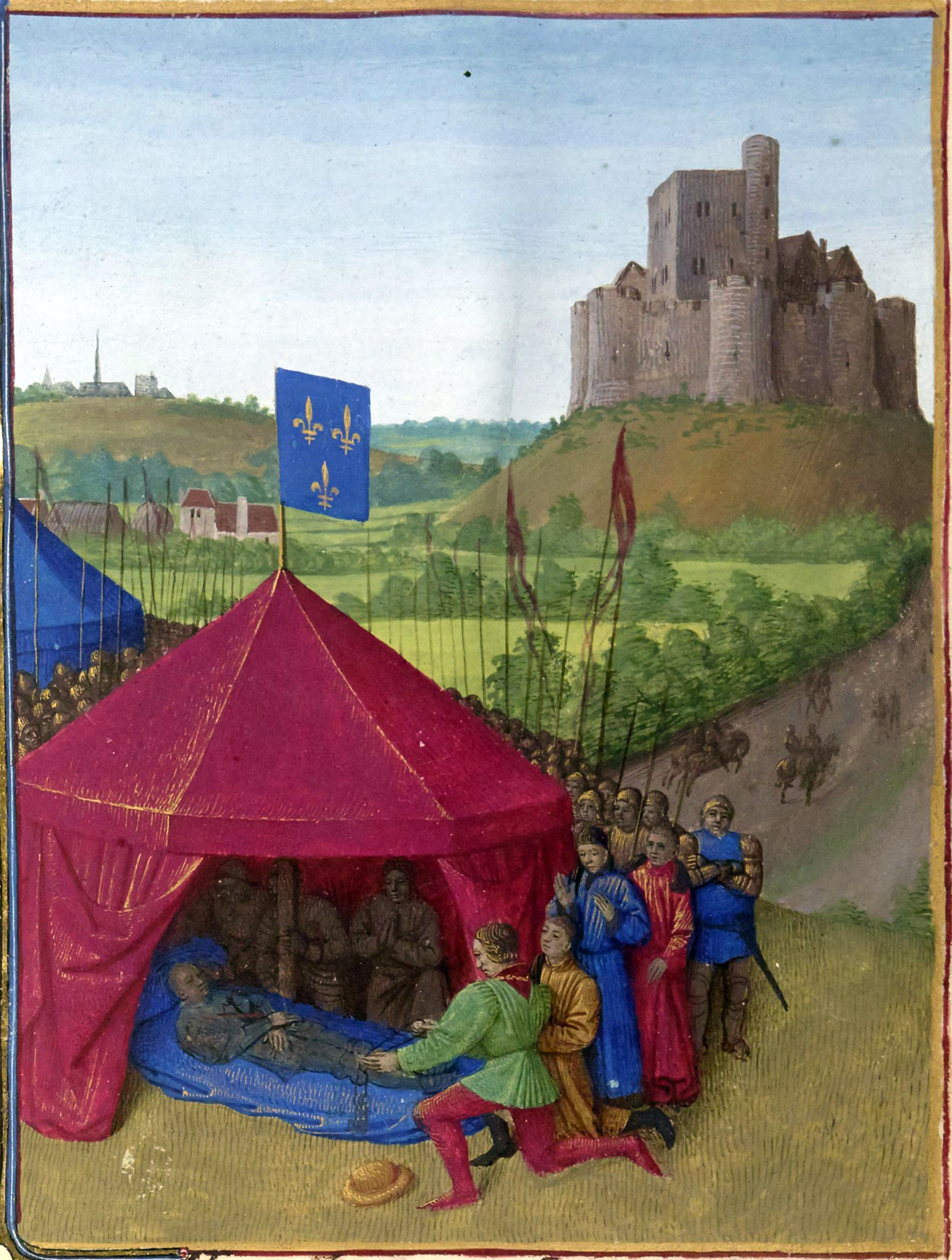 Mort de Bertrand Du Guesclin Grandes Chroniques de France, enluminées par Jean Fouquet, Tours, vers 1455-1460 Paris, BnF, département des Manuscrits, Français 6465, fol. 456 (Livre de Charles V) Lors du siège de Châteauneuf-de-Randon en Lozère, Bertrand Du Guesclin tombe malade et meurt le 13 juillet 1380.